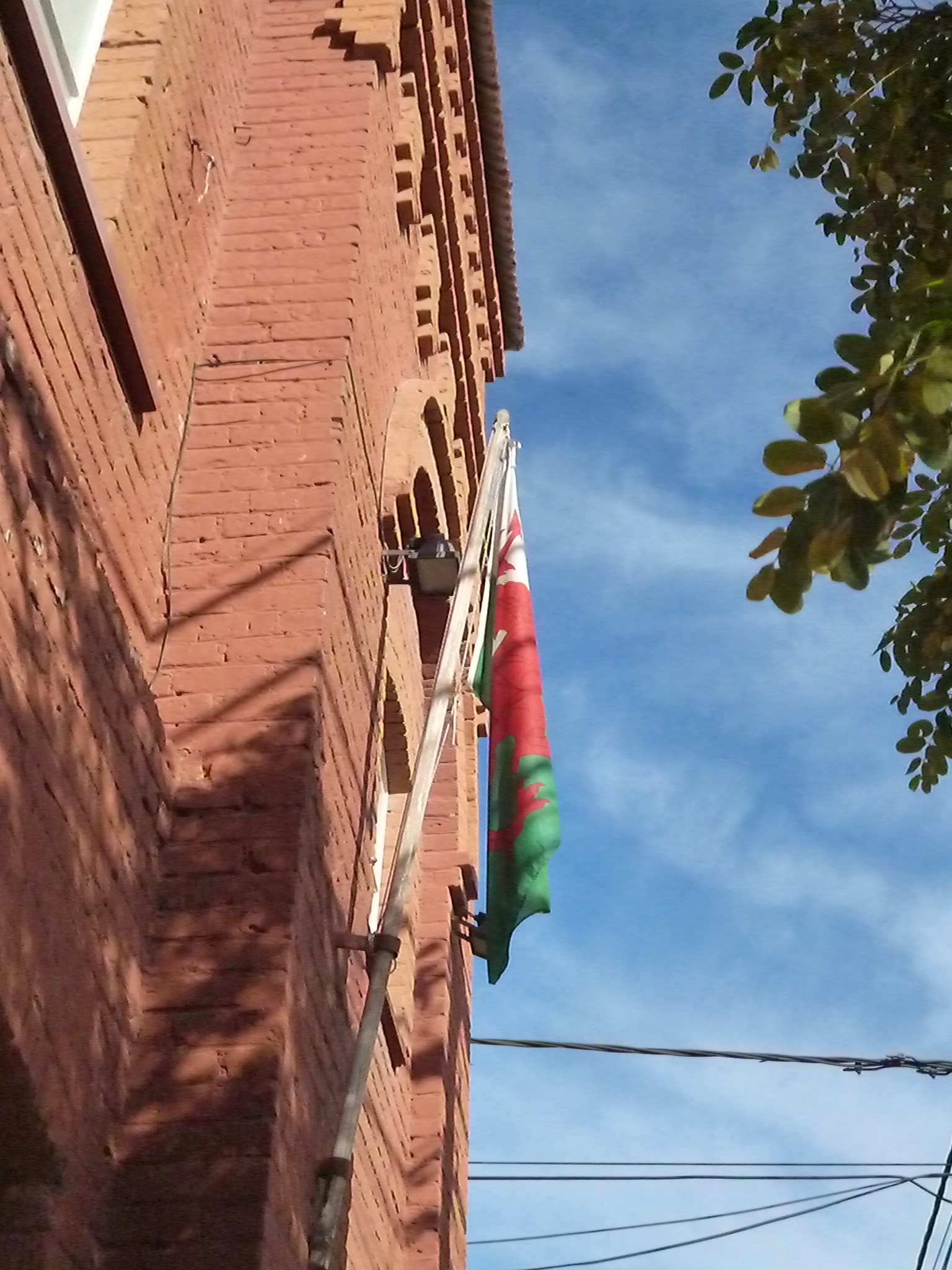 Bandera galesa en el Salón San David, Trelew, Argentina